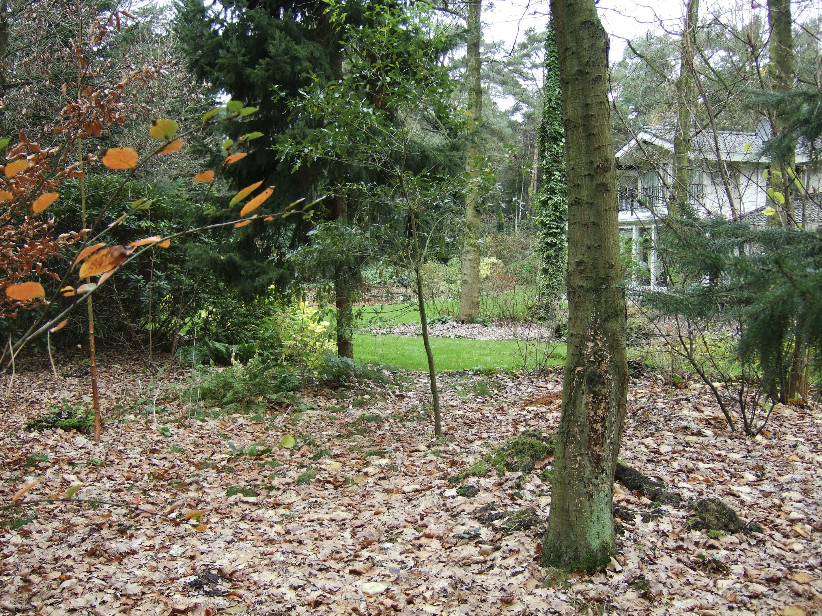 Archeologie/ Merovingisch grafveld. Datering: 6e-7e eeuw. Vroeg Middeleeuws grafveld nabij een woning. Archeoregio 4 (opmerking: Publicatie Uit Balans 2006)